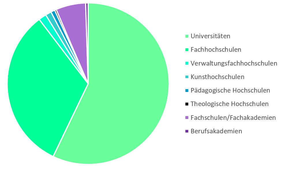 Datenquelle